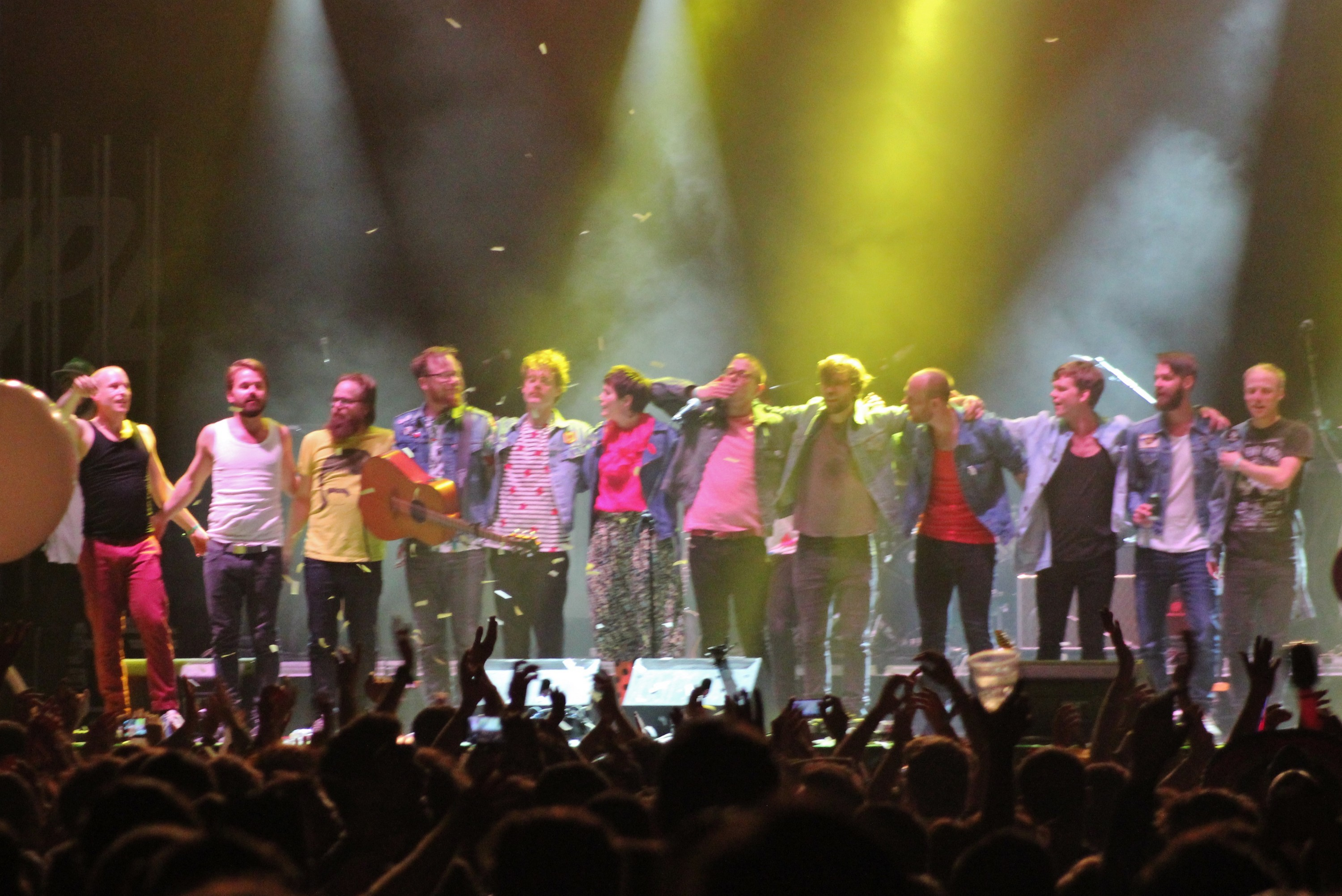 I'm from Barcelona es un grupo de música pop/folk de Jönköping, Suecia. Concierto en el Festival SOS 4.8 2015, en Murcia.